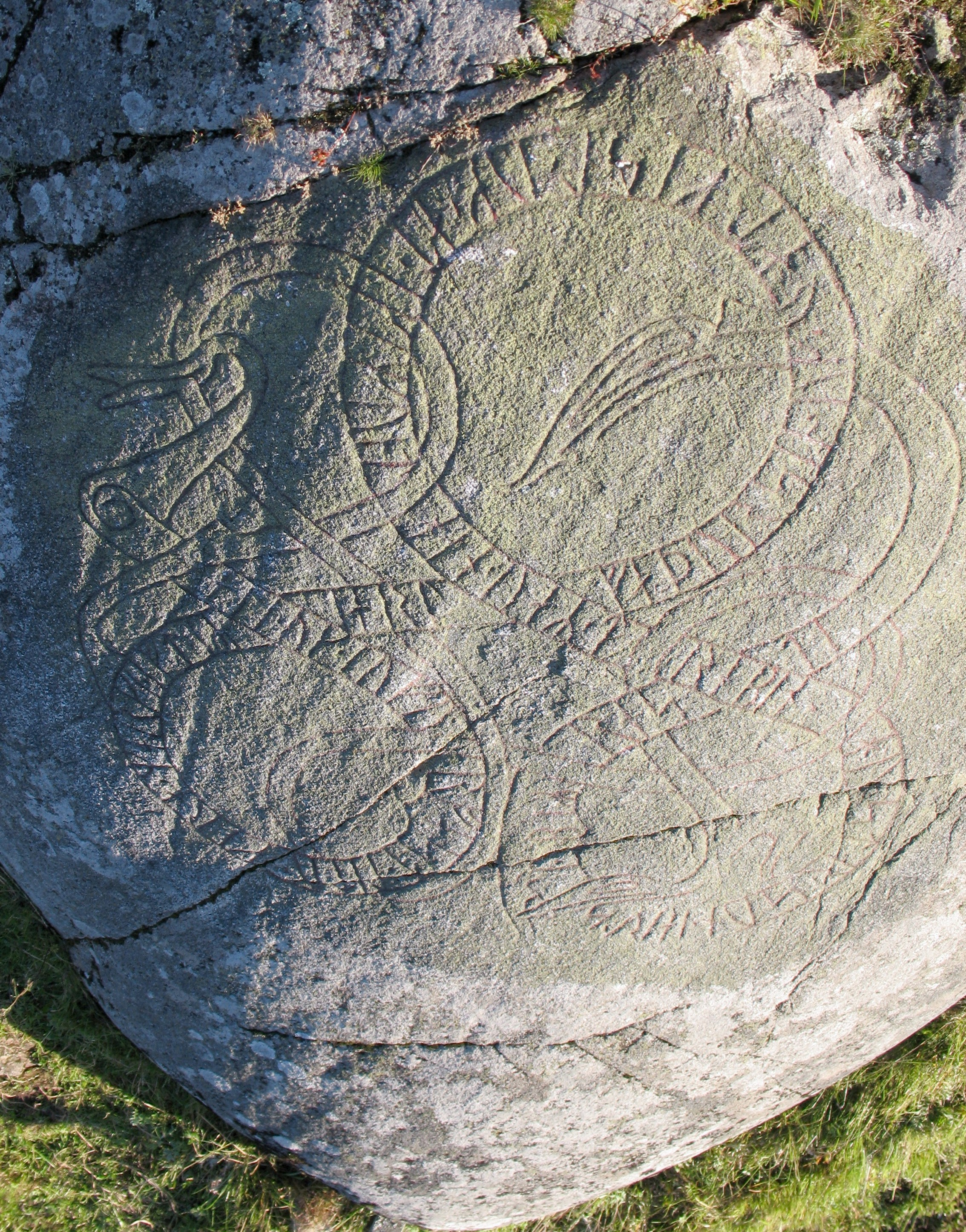 runestone